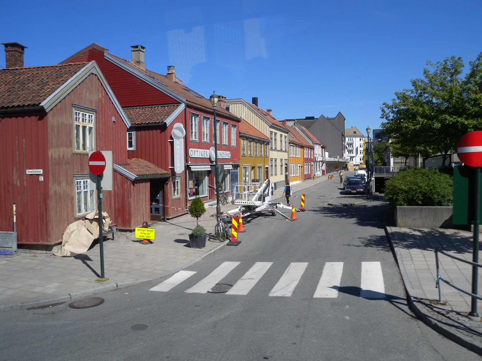 Repslagerveita in Trondheim, 2009.